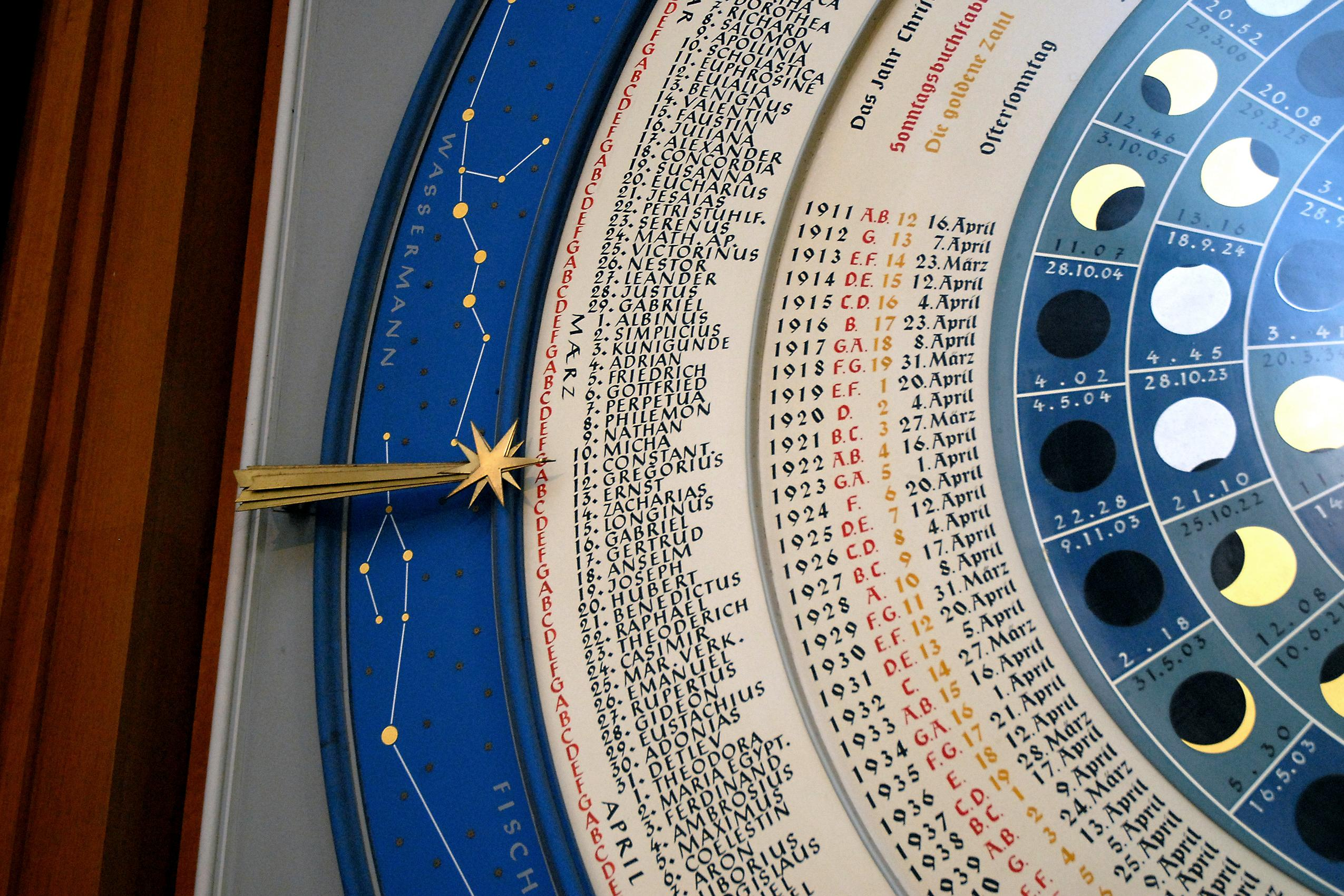 Astronomische Uhr der Kirche St. Marien, Lübeck (Detailansicht) siehe auch hier.